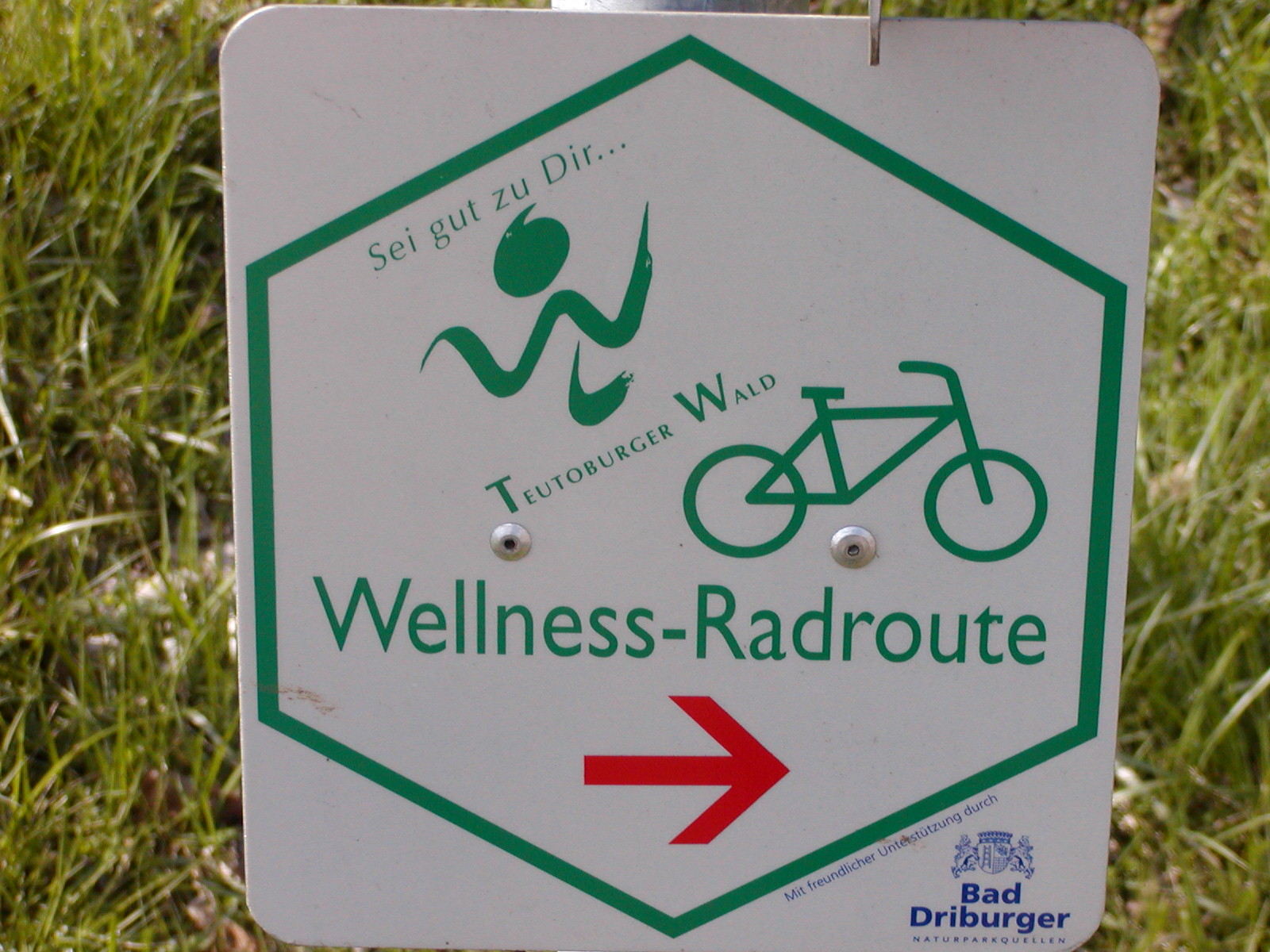 Ein Radroutenwegweiser mit dem Logo der mittlerweile nicht mehr unterhaltenen Wellness-Radroute an der Weser bei Minden, Nordrhein-Westfalen.